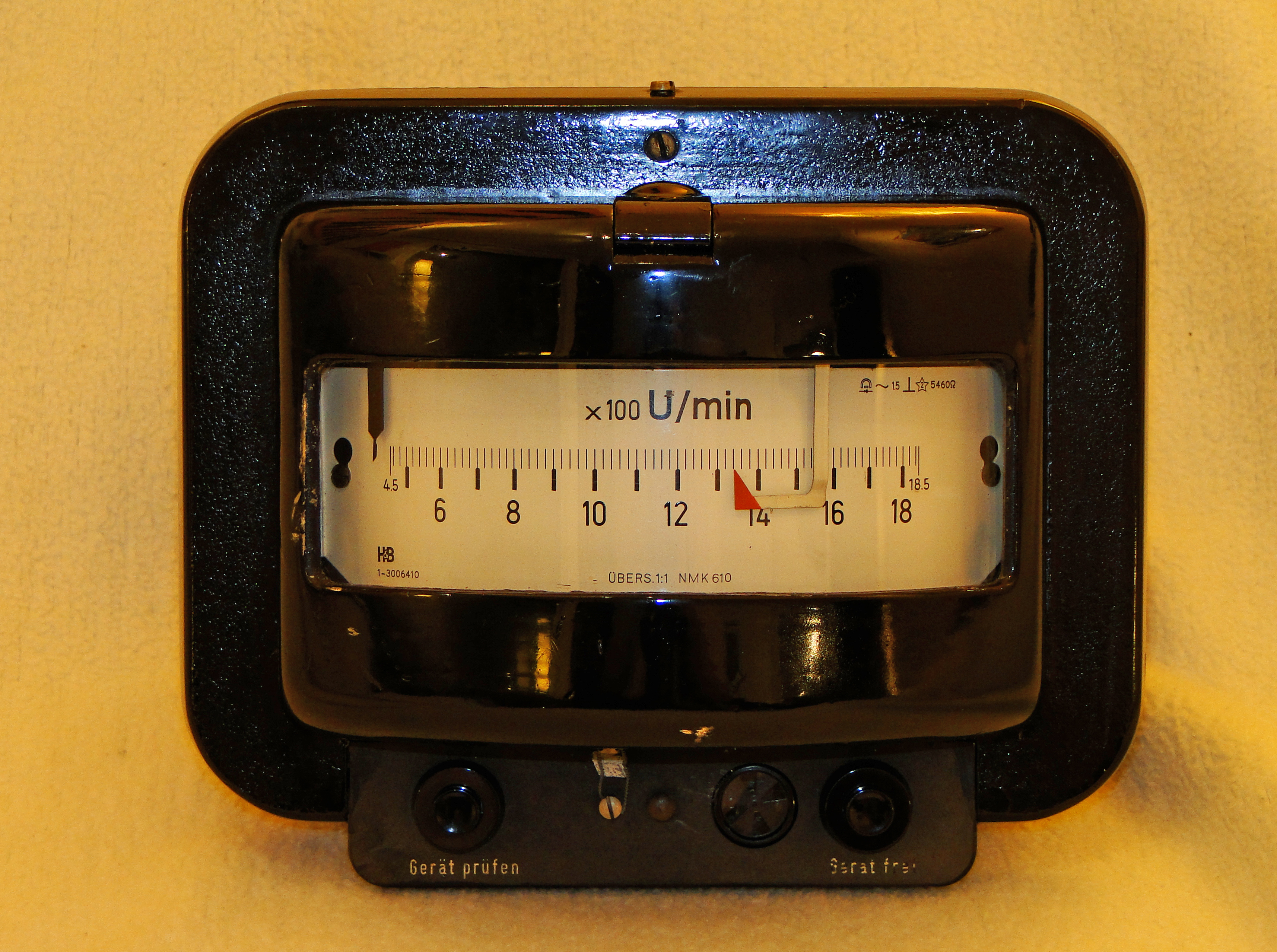 Messkontakter für die Überwachung der Motordrehzahl einer Diesel-Lokomotive. Wird der voreingestellte Wert überschritten, stellt die Überwachungseinrichtung den Dieselmotor ab. (s.a. Drehzahlmesser)